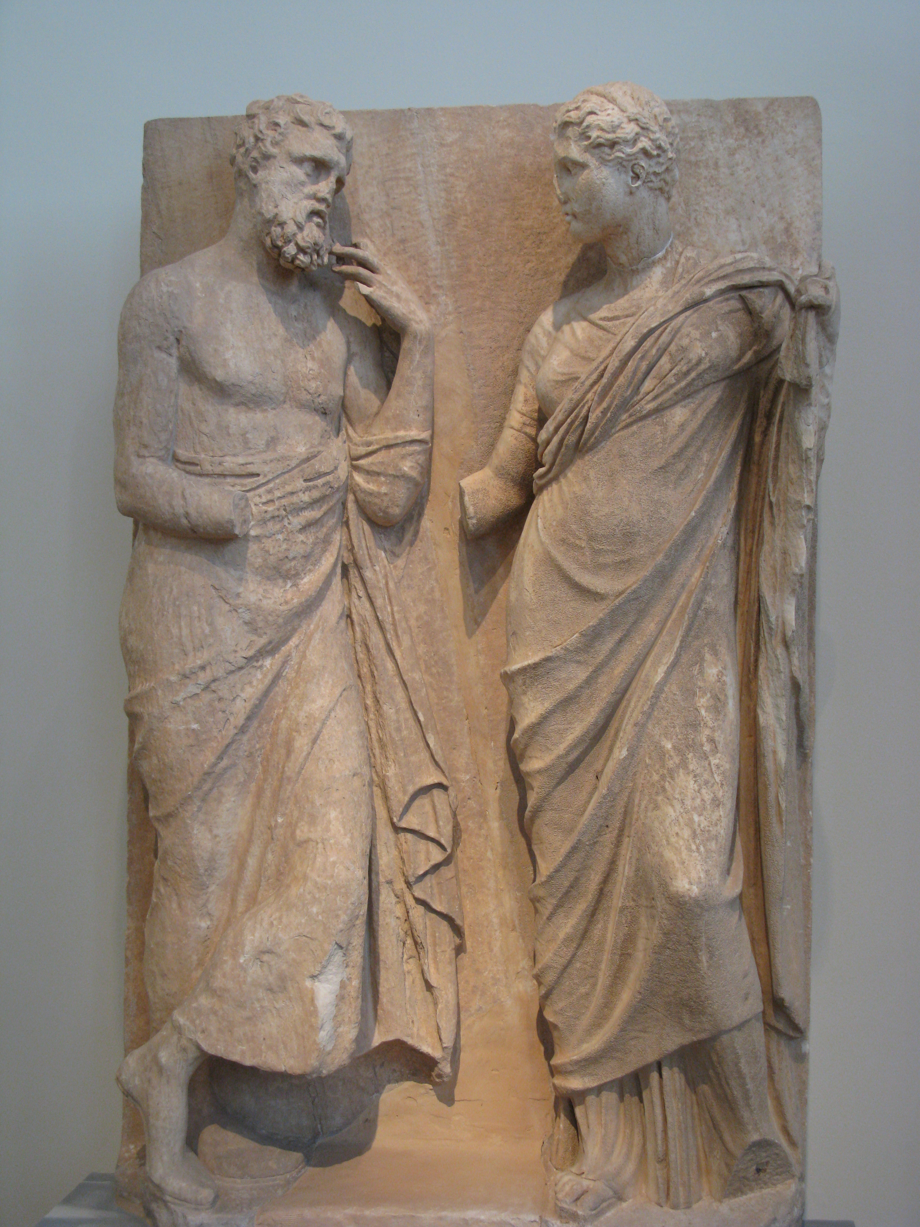 833. Grave relief. Pentelic marble. Found at Rhamnous, Attica. A mature, bearded man, leaning on his staff, and a young woman shake hands in silence, united even after death. The outstanding beauty of the woman, with her fine features, willowy figure and elegant stance recall statues by Praxiteles. The relief belongs to a nmskos from the funerary enclosure of HierokJes. The pedimental crowning of the noiskos inscribed with the names of the dead, Hieron son of Hierokles. of Rhamnous and Lysippe, is at Rhamnous. So, too, is the base of the noiskos with an epigram referring to Hieron and his four brothers, who predeceased him. 325-300 BC. National Archaeological Museum, Athens, Greece. --- 833. Επιτύμβιο ανάγλυφο. Μάρμαρο πενχελικό. Βρέθηκε στον Ραμνούντα Αττικής. Ένας ώριμος, γενειοφόρος άνδρας στηριγμένος σε βακτηρία και μια νεαρή γυναίκα δίνουν σιωπηλά τα χέρια, ενωμένοι και μετά θάνατον. Η ξεχωριστή ομορφιά της γυναίκας με τα λεπτά χαρακτηριστικά, τη λυγερή κορμοστασιά και την κομψότητα της στάσης παραπέμπει σε αγάλματα του Πραξιτέλους. Ανήκει σε επιτύμβιο ναΐσκο από τον ταφικό περίβολο του Ιεροκλέους. Η αετωματική επίστεψη με τα ονόματα των νεκρών, Ιέρων, γιος του Ιεροκλέους, από τον Ραμνούντα και Λυσίππη, βρίσκεται στον Ραμνούντα. Εκεί βρίσκεται επίσης και η βάση του ναϊσκου με επίγραμμα, στο οποίο γίνεται αναφορά στον Ιέρωνα και στα τέσσερα αδέλφια του που πέθαναν πριν από αυτόν. 325-300 π.Χ. Εθνικό Αρχαιολογική Μουσείο. Αθήνα.